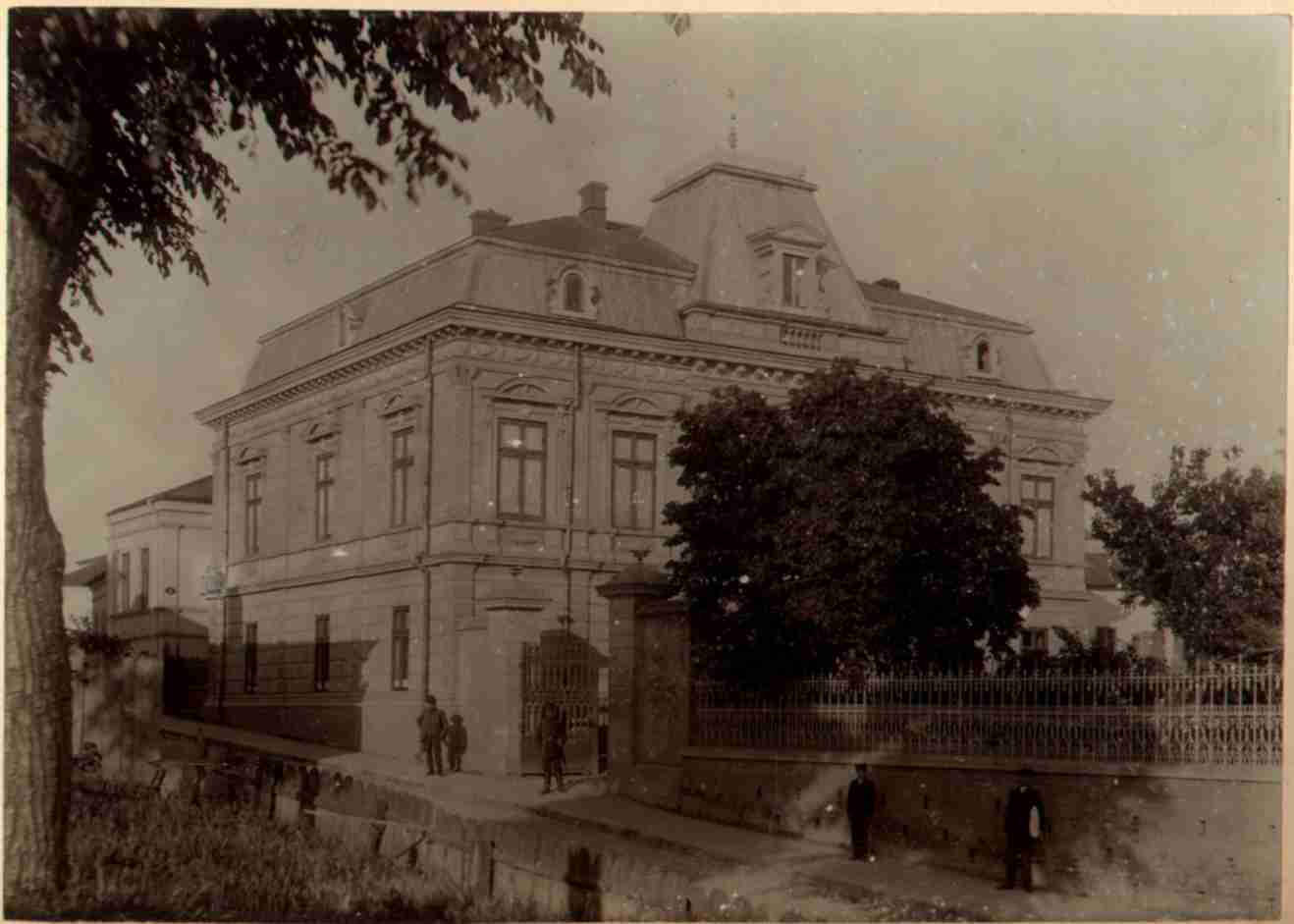 Casa Fântâneanu, în trecut.